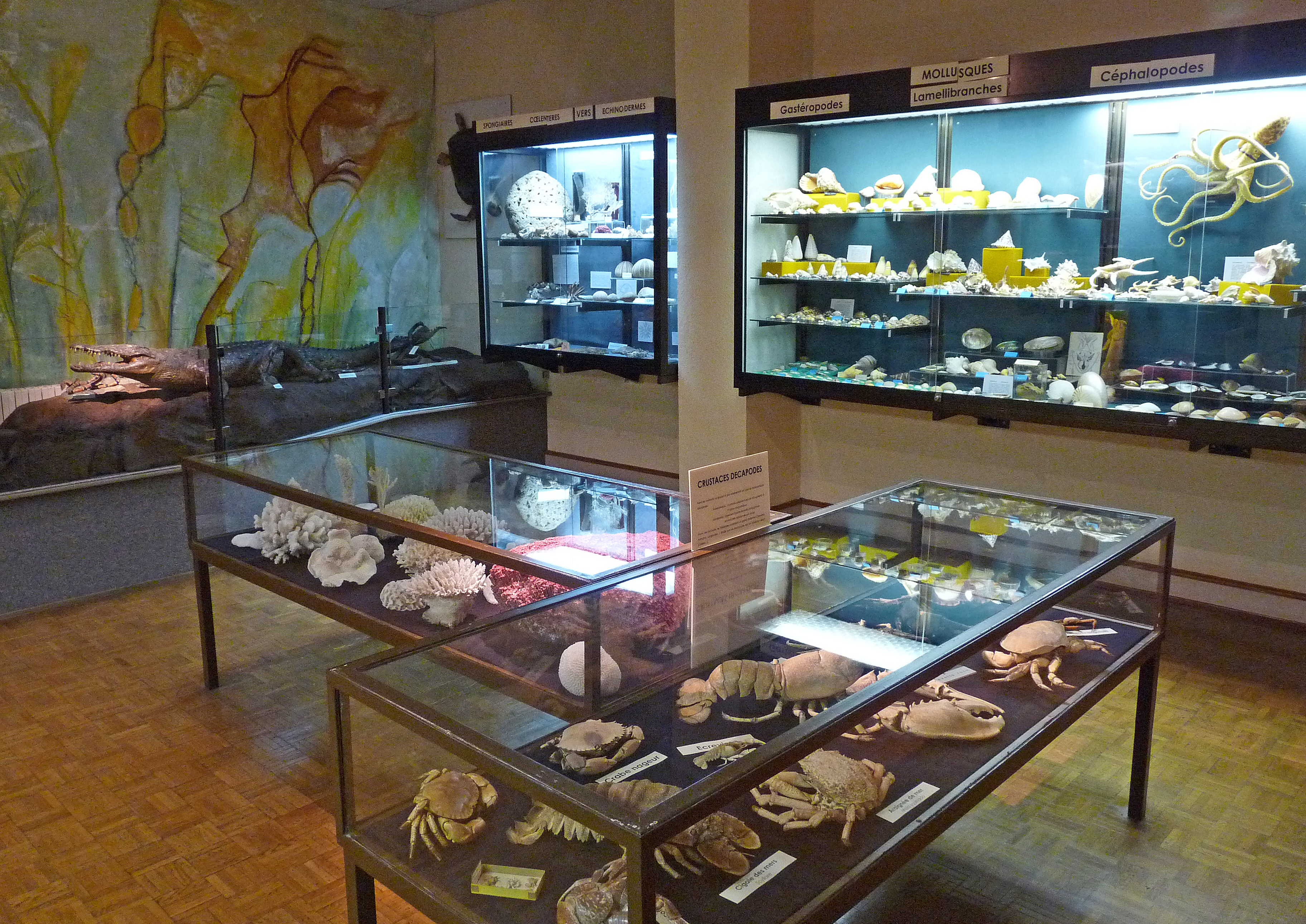 Salle des invertébrés marins. Musée d'histoire naturelle et d'ethnographie de Colmar